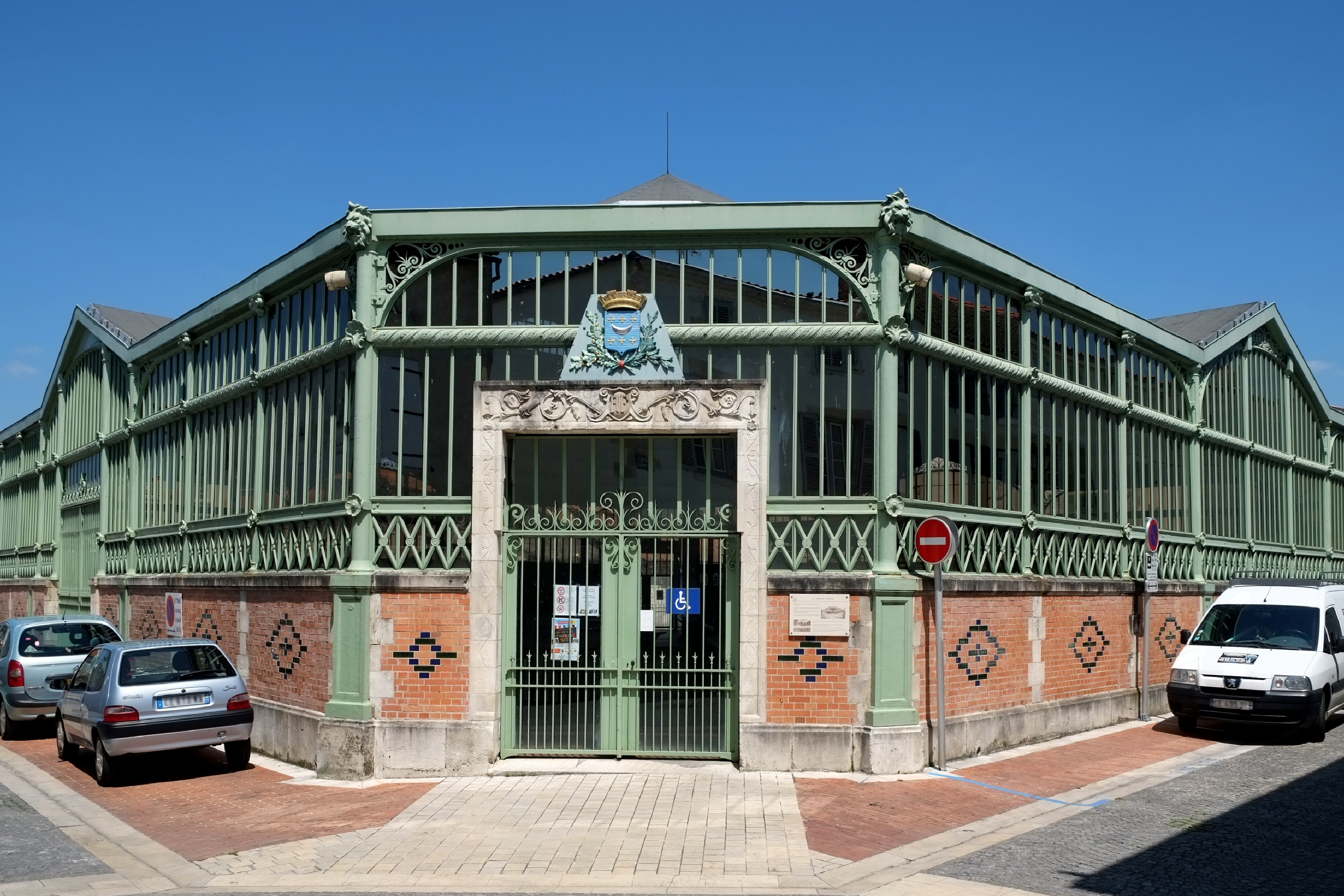 Halle du marché Marans Charente-Maritime France